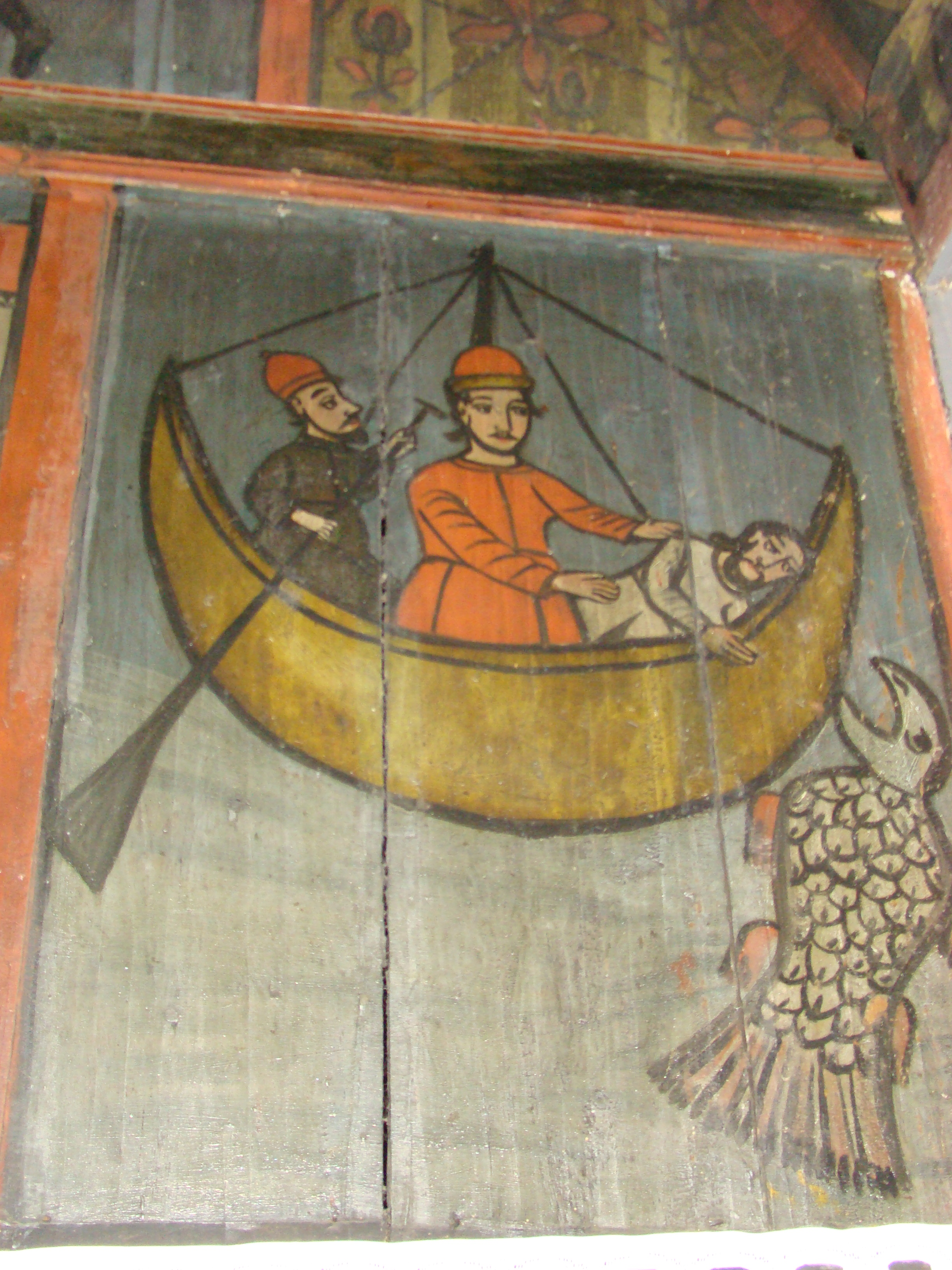 Biserica de lemn „Sf.Dumitru” din Păușa, județul Bihor